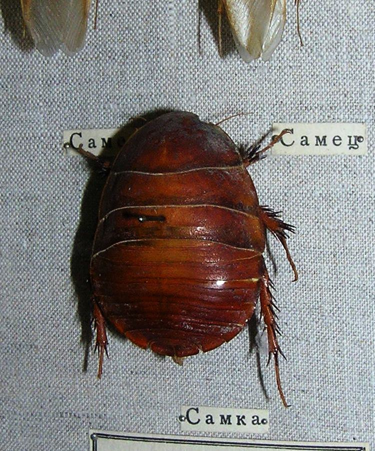 Самка таракана Polyphaga pellucida. Зоологический музей в Санкт-Петербурге. This photograph taken in Zoological Museum of the Zoological Institute of the Russian Academy of Sciences Note: It is only museum co-ordinates, instead of an area of live animals.